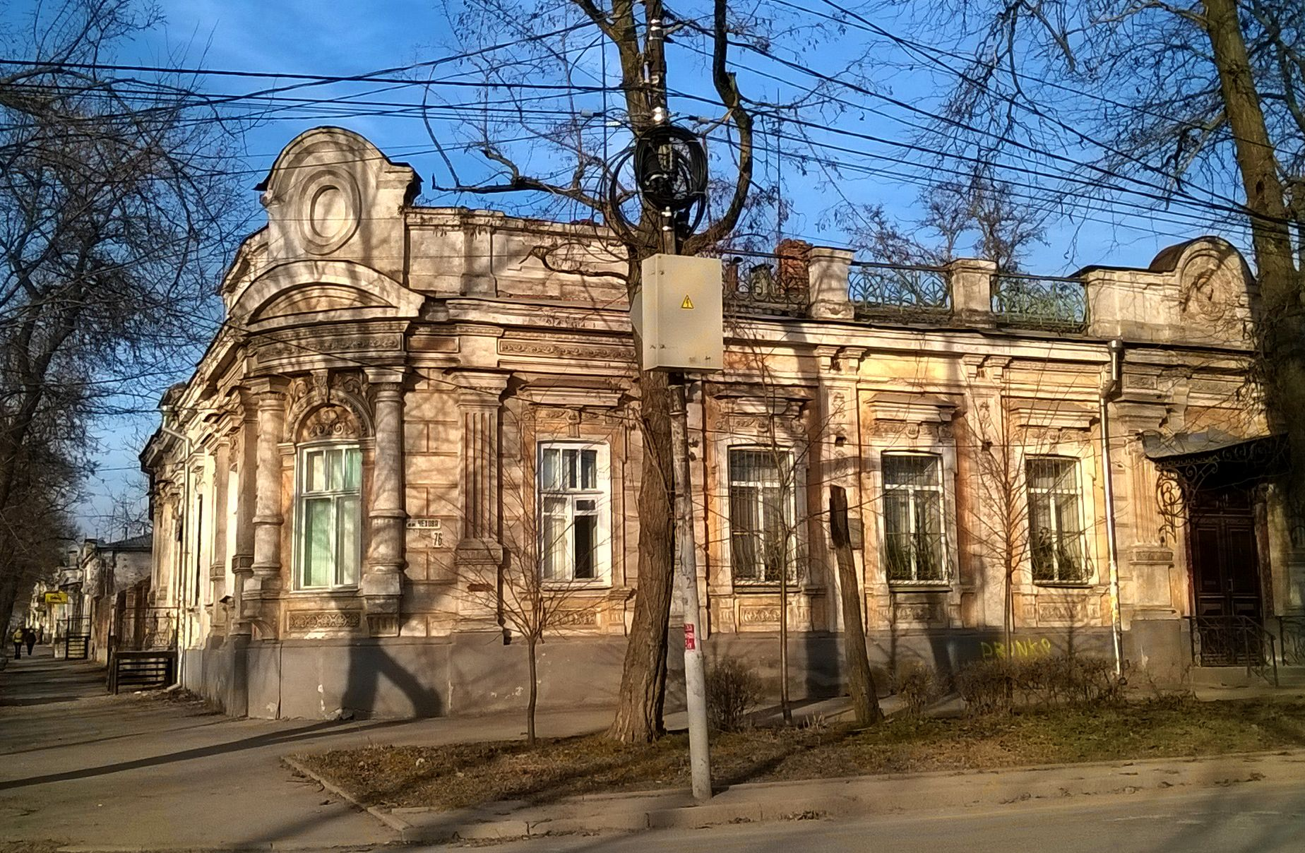 Дом Шедеви: улица Чехова, 76, Таганрог, Ростовская область